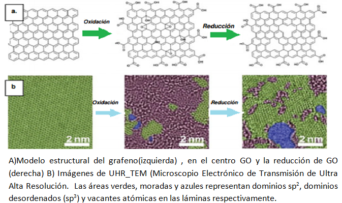 Desventaja de la Reduccion del Óxido de Grafeno